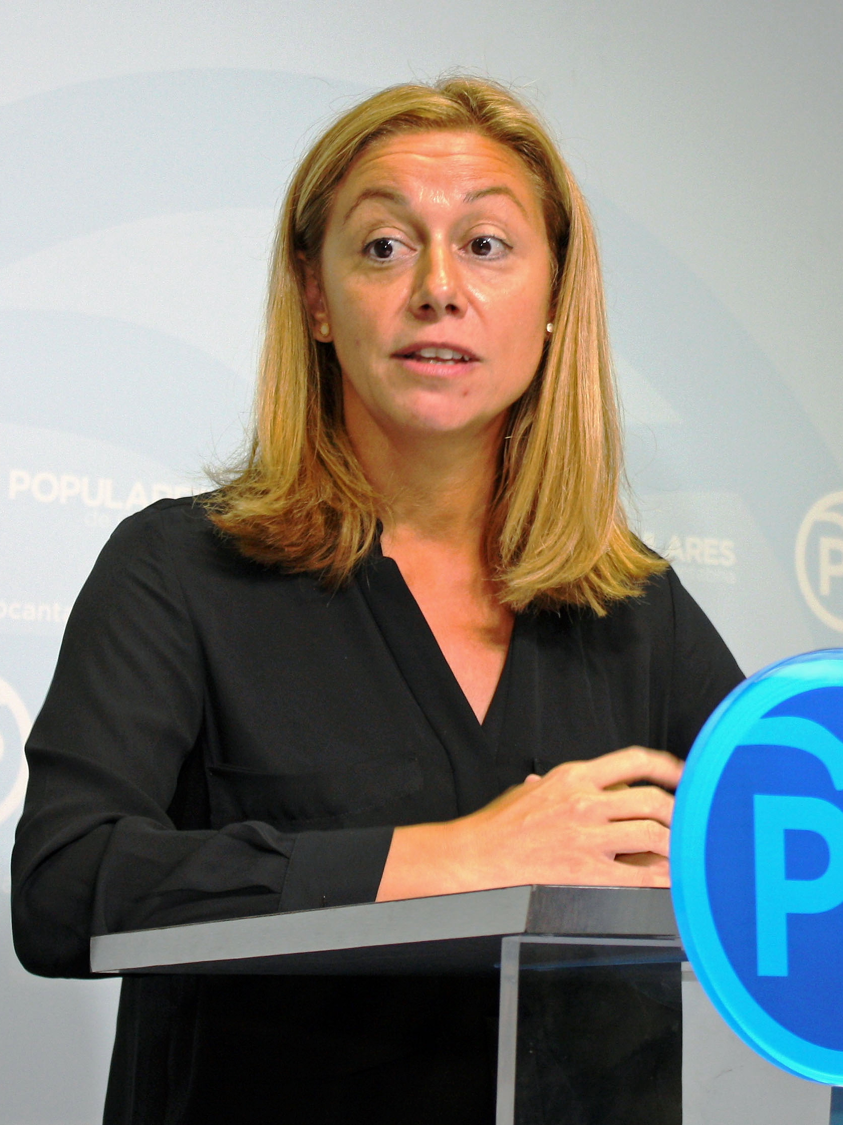 La portavoz de Economía del PP y diputada regional, Cristina Mazas, ofreció una rueda de prensa el 21 de agosto de 2015.